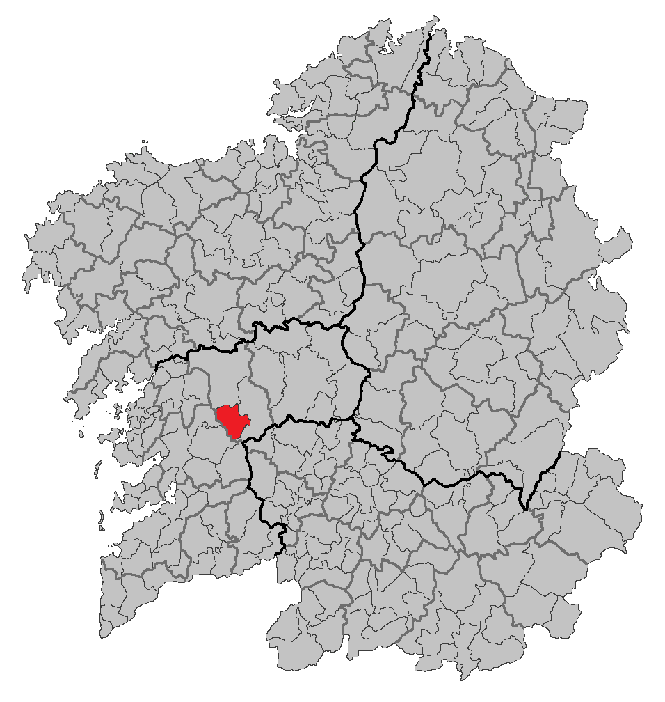 Mapa coa localización do concello de Cerdedo.